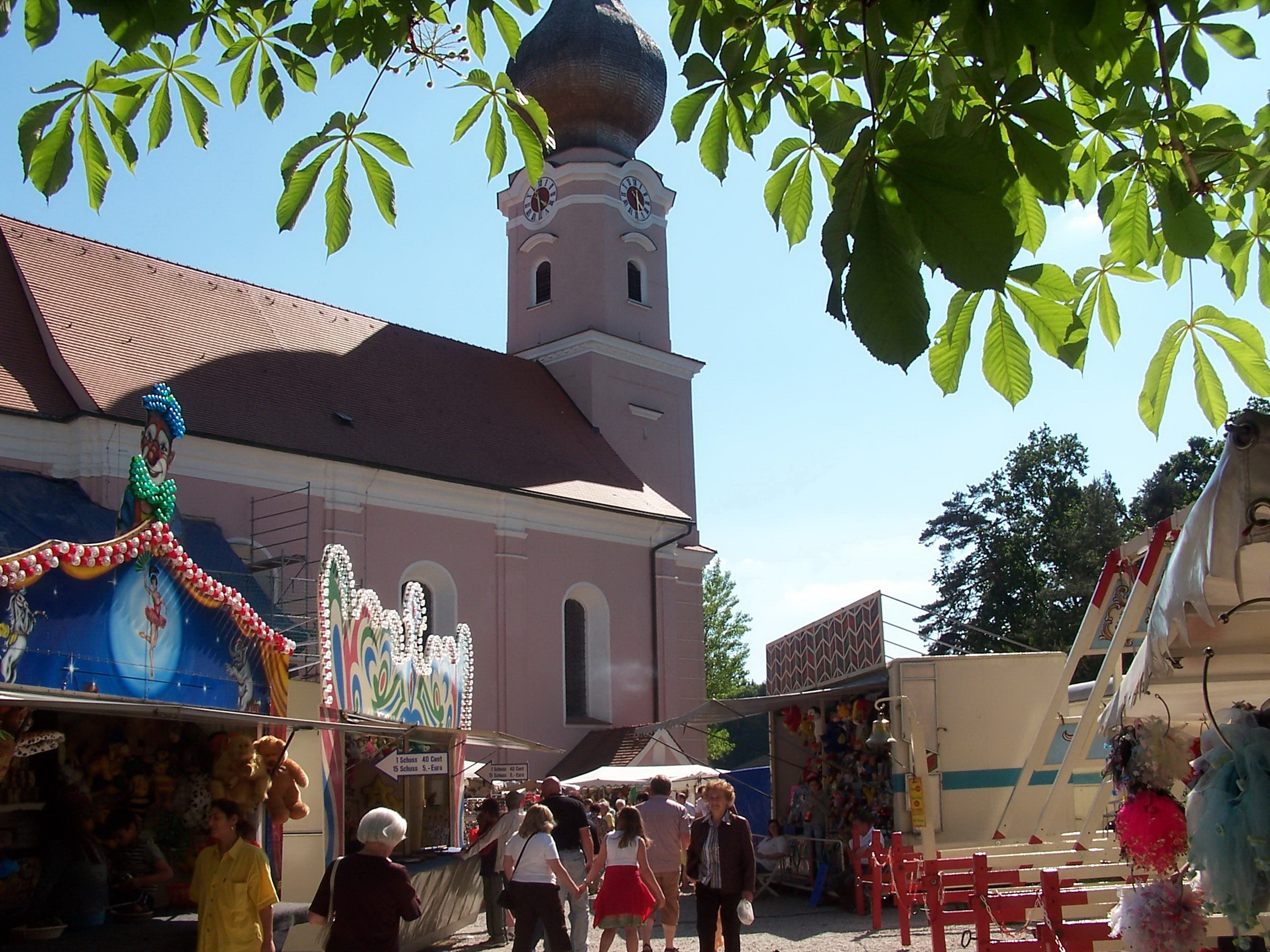 Neben der Wallfahrtskirche befindet sich in Dreifaltigkeitsberg der Landgasthof Scheugenpflug mit Biergarten und Fremdenzimmern. Am Pfingstsonntag, Pfingstmontag und Dreifaltigkeitssonntag findet das jährliche Pfingsttriduum statt, das mit der Patroziniumsfeier am Dreifaltigkeitssonntag seinen Abschluss findet. Es ist eine Freude in diesem, bis auf den letzten Platz gefüllten Gotteshaus den Festgottesdienst mit Gebet und Gesang mitzufeiern. Nach dem Gottesdienst in der Wallfahrtskirche am Dreifaltigkeitssonntag (Sonntag nach Pfingsten) findet auf dem Platz zwischen Kirche und Wirtshaus ein Dultbetrieb statt.